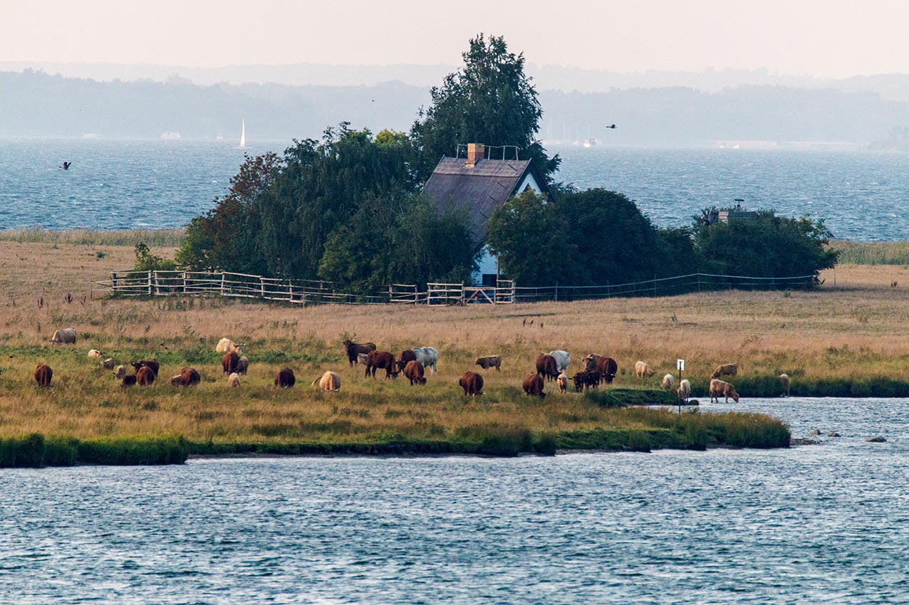 Ornithologische Station auf dem Großen Schwerin in Mecklenburg